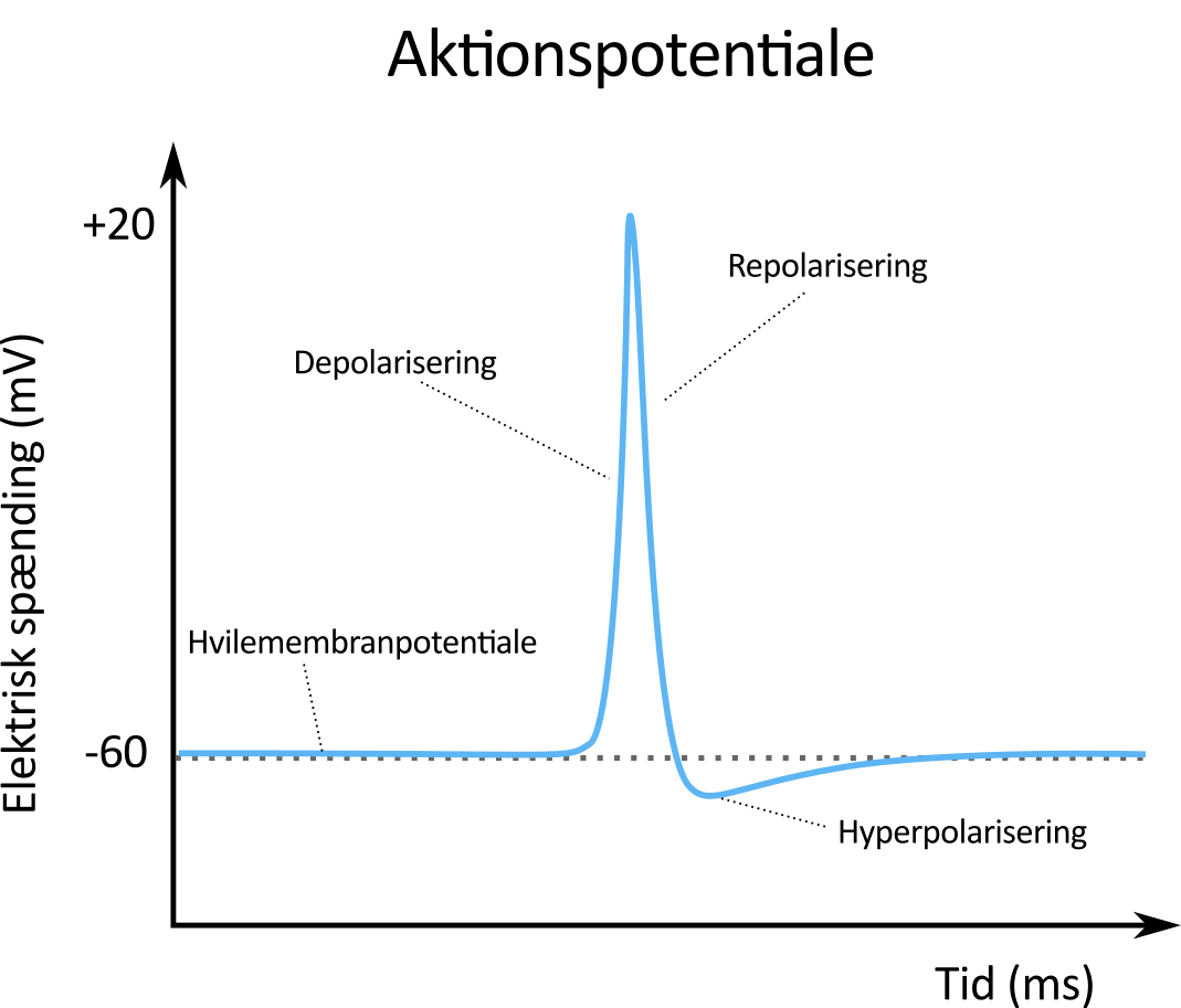 Skitse af et aktionspotentiale målt i et neuron. På skitsen er også en beskrivelse af aktionspotentialets forskellige faser.